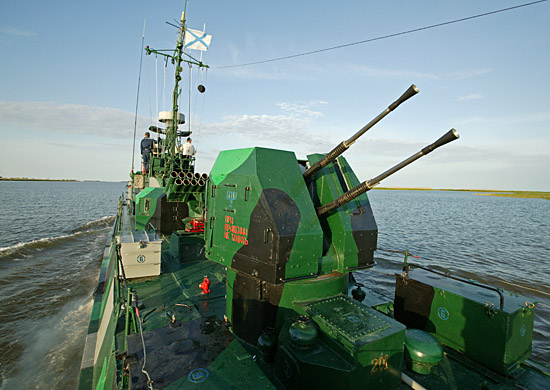 Проекта 1204 "Шмель" - Дивизионом артиллерийских катеров охраны водного района Каспийской флотилии